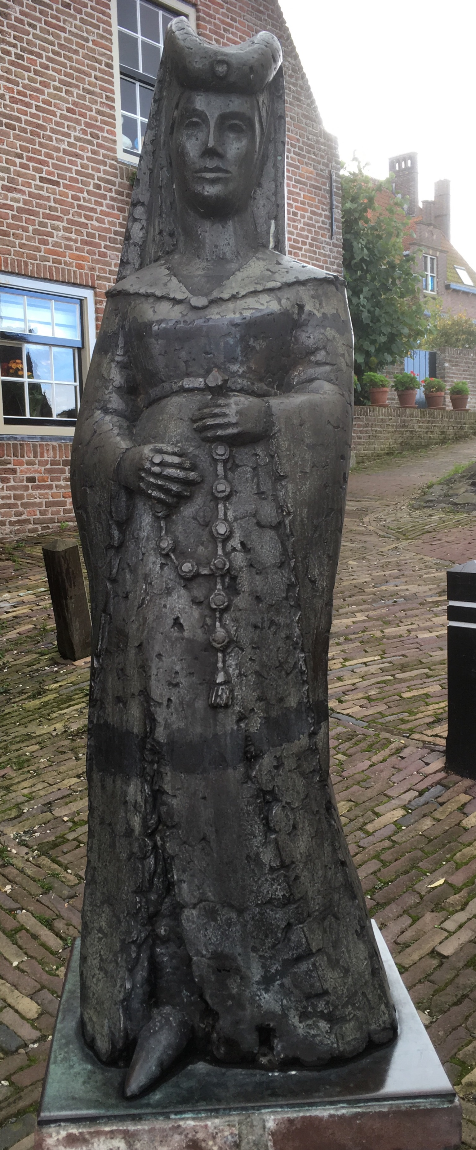 Beeld van Jacoba van Beieren in Woudrichem. Vuilnisbak verwijderd.